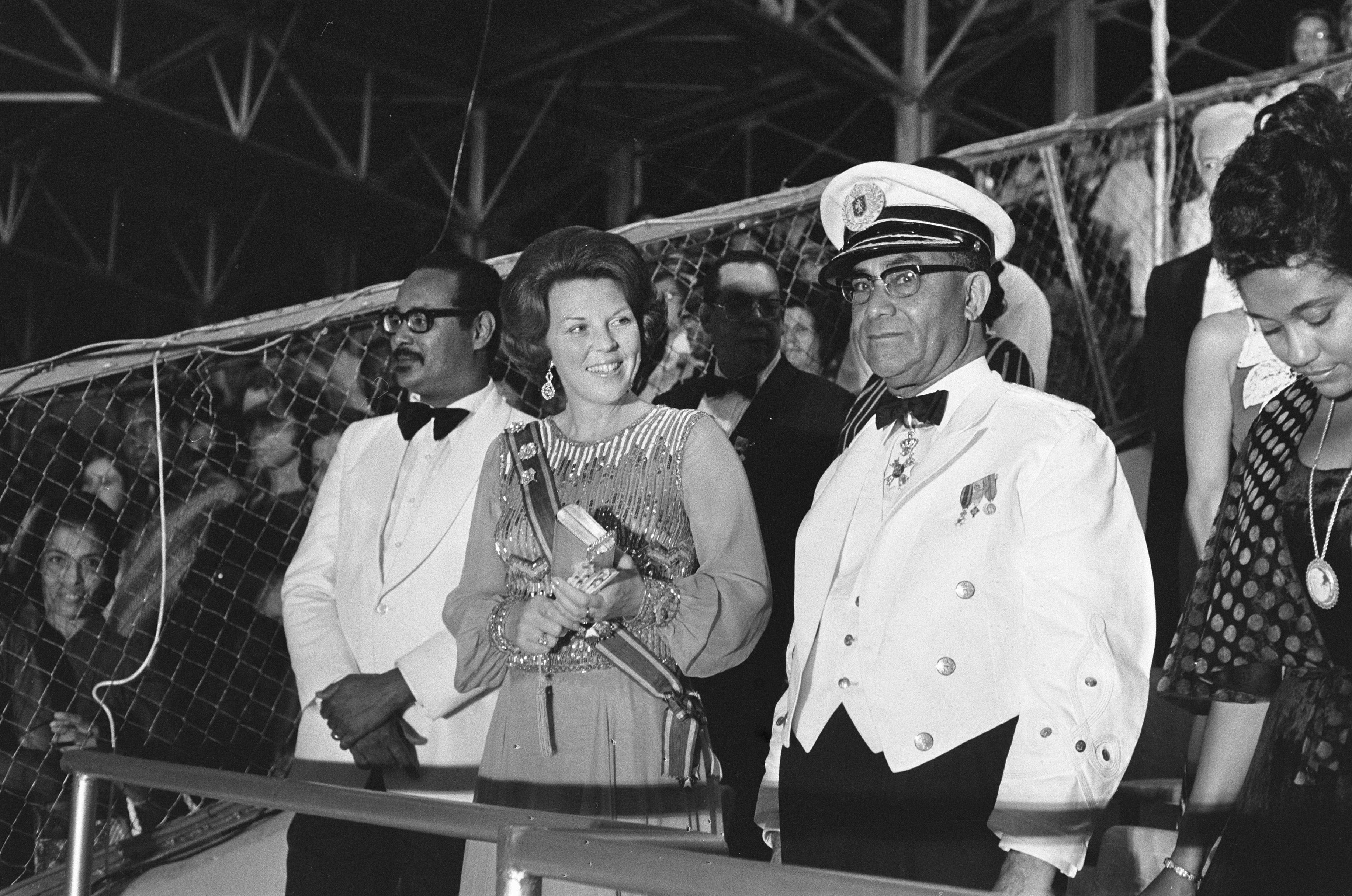 Suriname: onafhankelijkheid op 25/11 etc.; plechtigheden in stadion van Paramaribo (vlagwisseling etc.), v.l.n.r. Arron, Beatrix en Ferrier